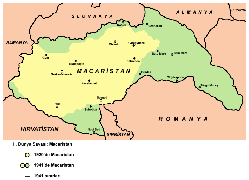 Macaristan haritası